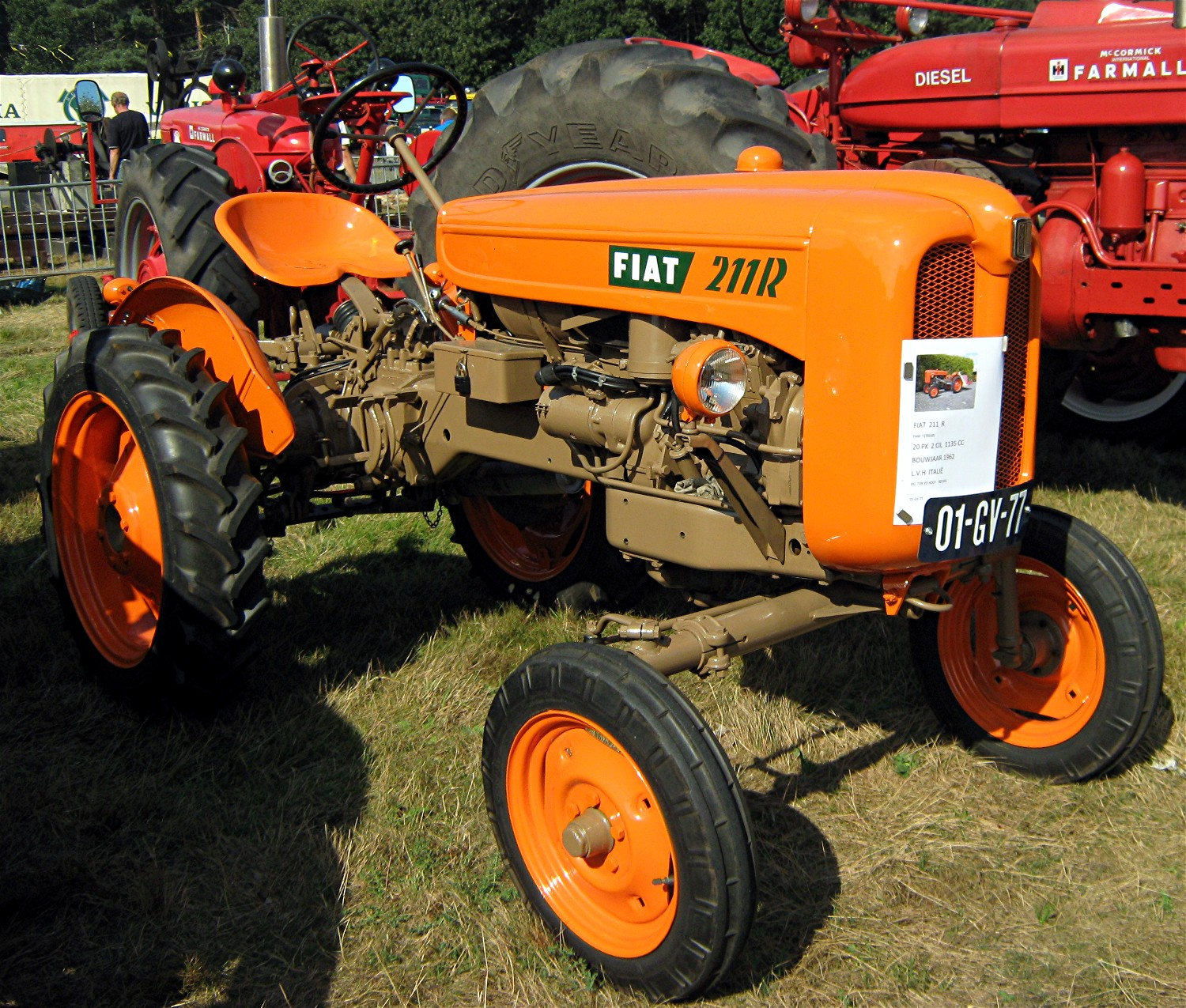 Vliegfeld Weelde, 21ste Oldtimer Festival des Historische Machineclubs Kempen, Fiat 211 R